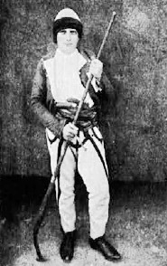 Albanska virdžina